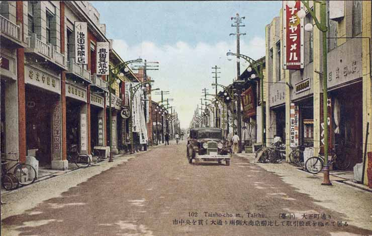 日治時期台中市大正町通街景，現今的台中市自由路。